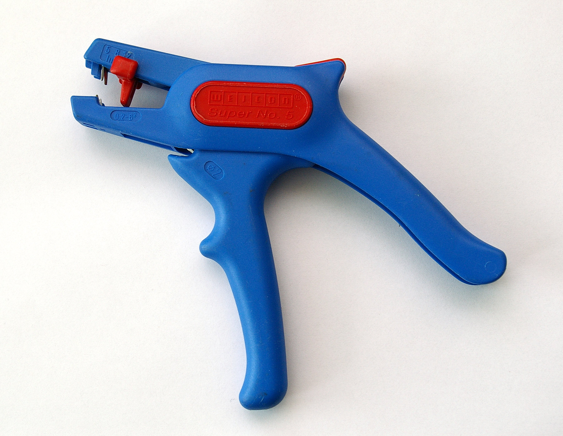 weicon automatische Abisolierzange 0,25 - 6 mm² mit einstellbarer Abmantellänge und Kabelschneider bis 2mm Durchmesser